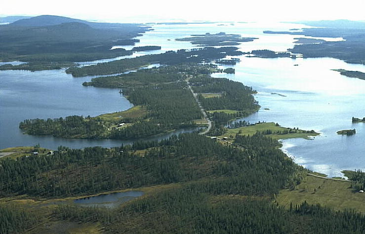 Motiv: Kasker Nyckelord: Flygbilder, Riksintressen Kategori: Insjömiljöer Kasker